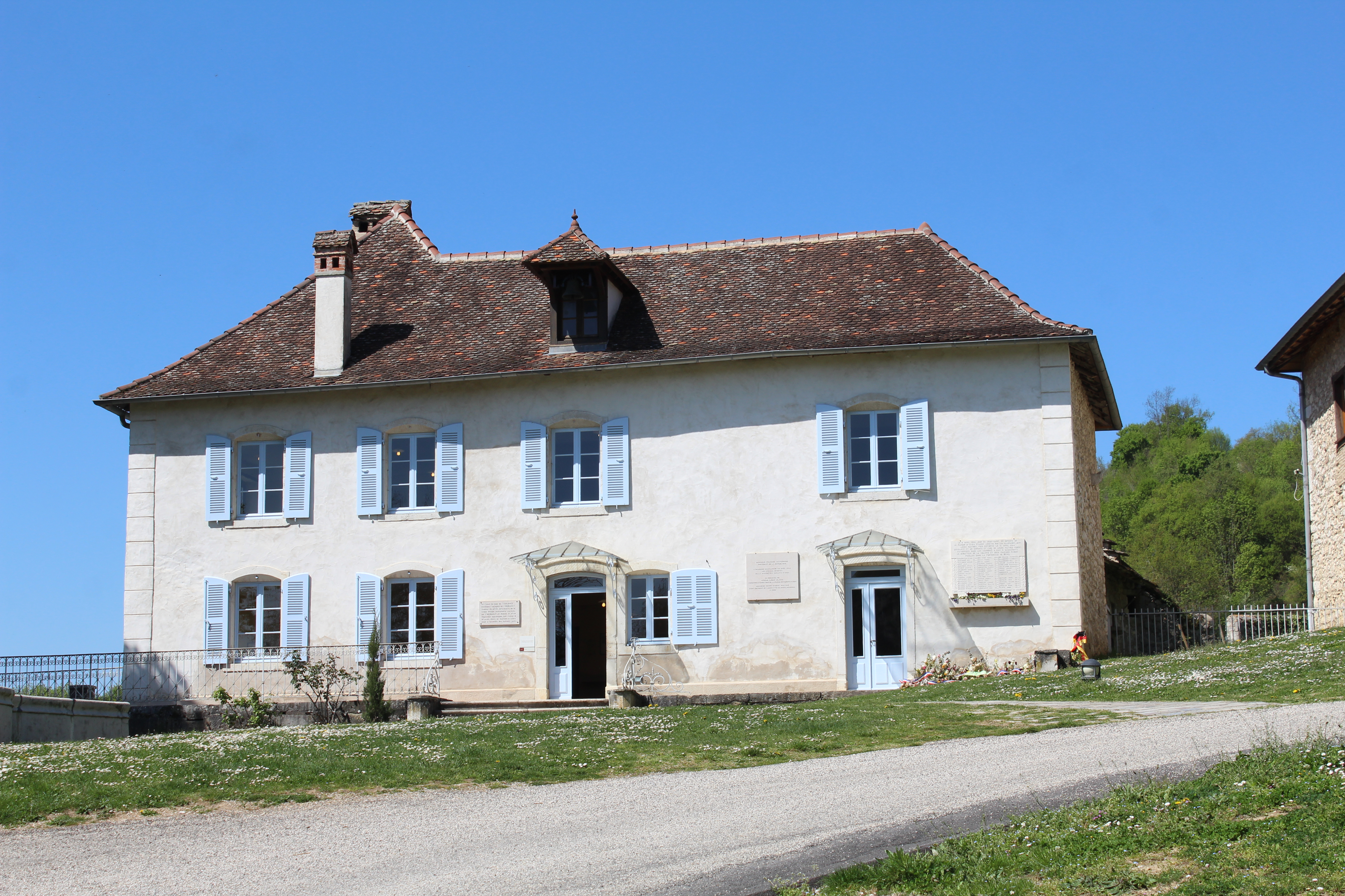 Mémorial des enfants juifs exterminés d'Izieu.